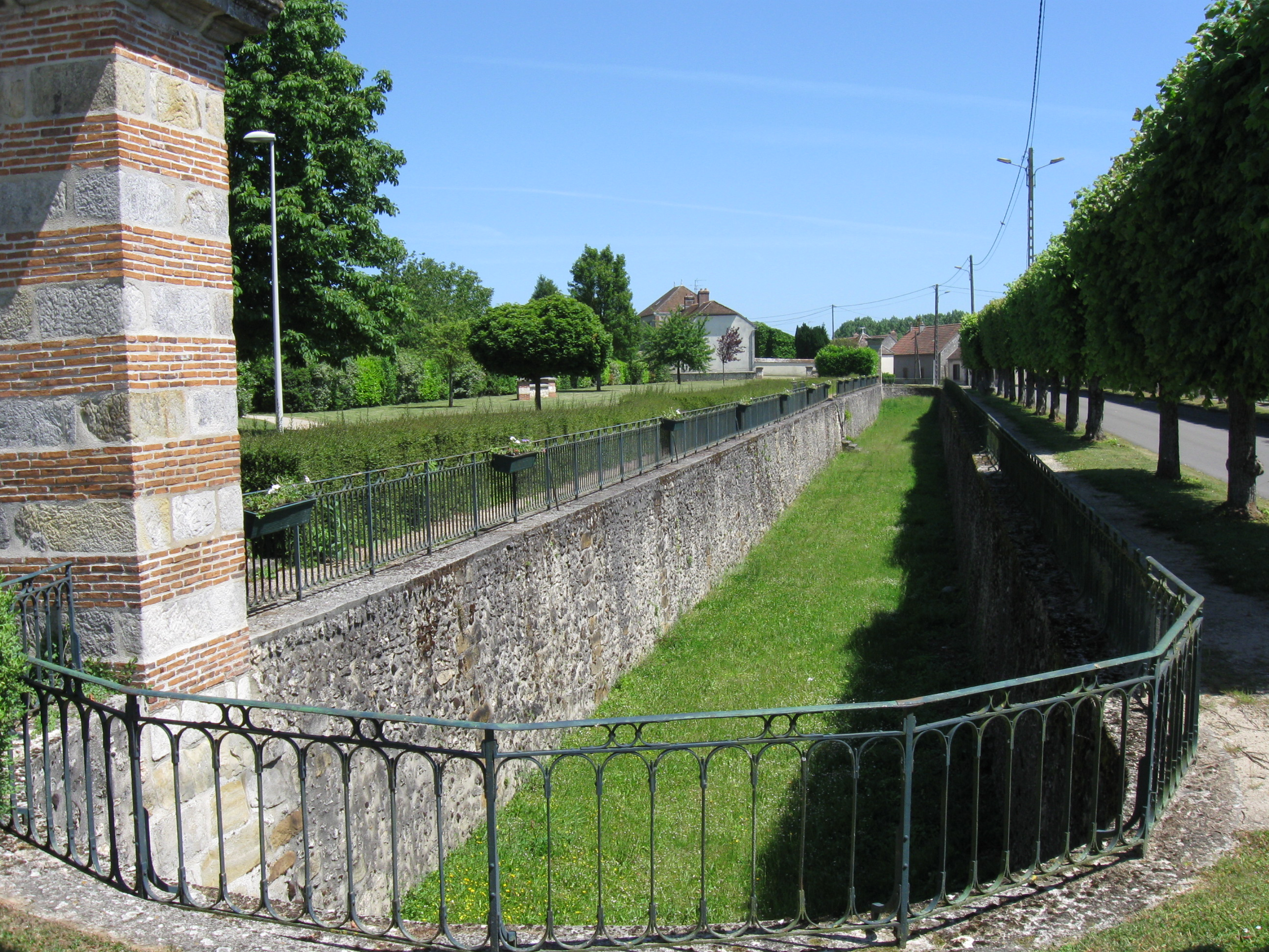 Saut-de-loup (Ha-ha), parc de l'ancien château à Everly. (Seine-et-Marne, région Île-de-France).